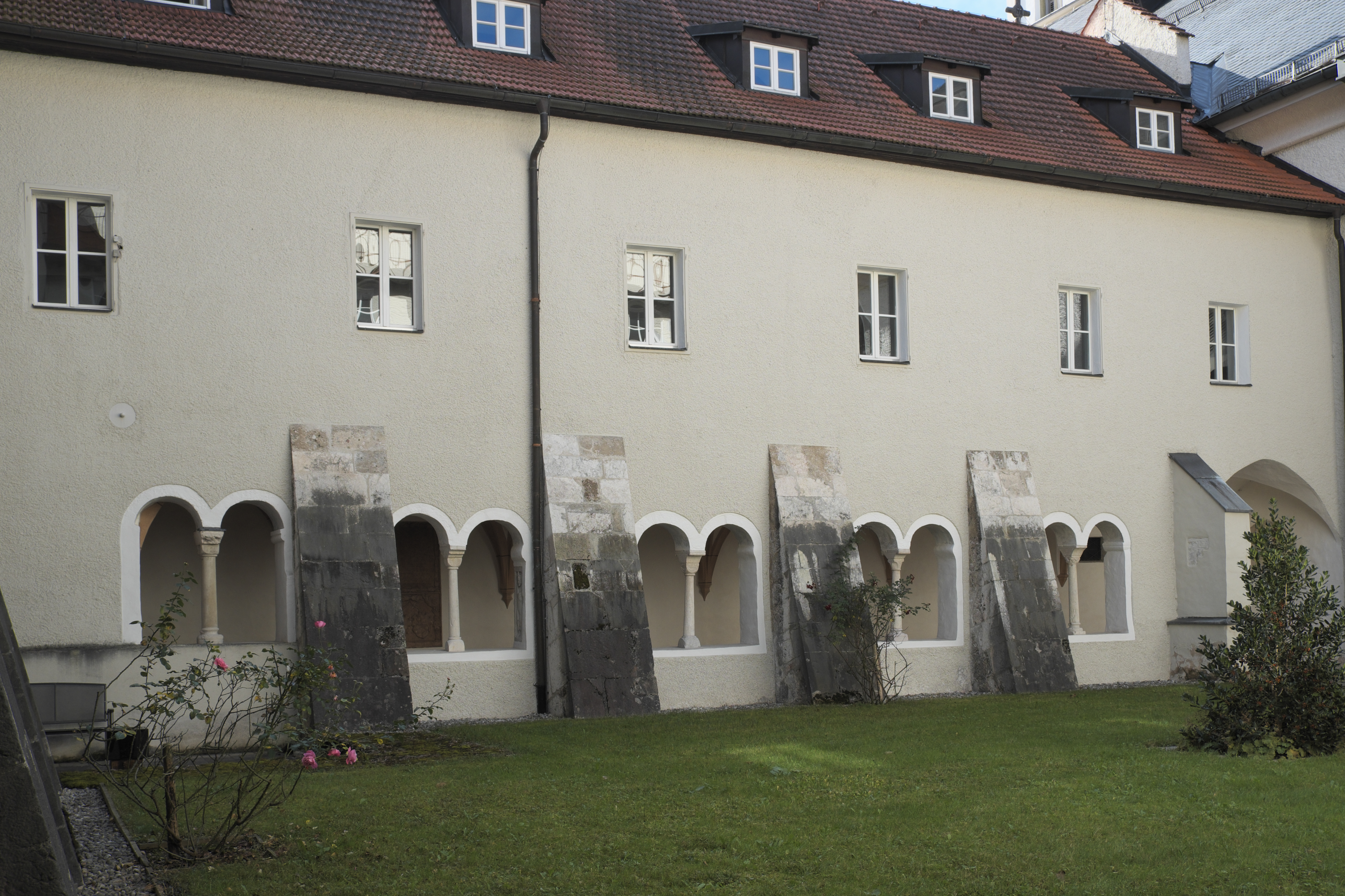 Kloster St. Zeno in Bad Reichenhall im Landkreis Berchtesgadener Land (Bayern/Deutschland), Kreuzgang